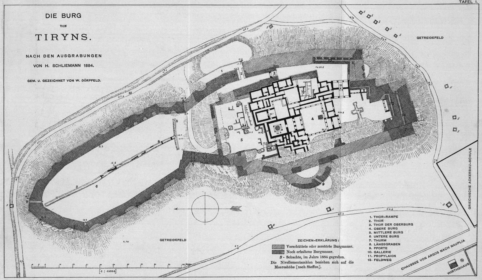 Die Burg von Tiryns. Nach den Ausgrabungen von Heinrich Schliemann 1884.